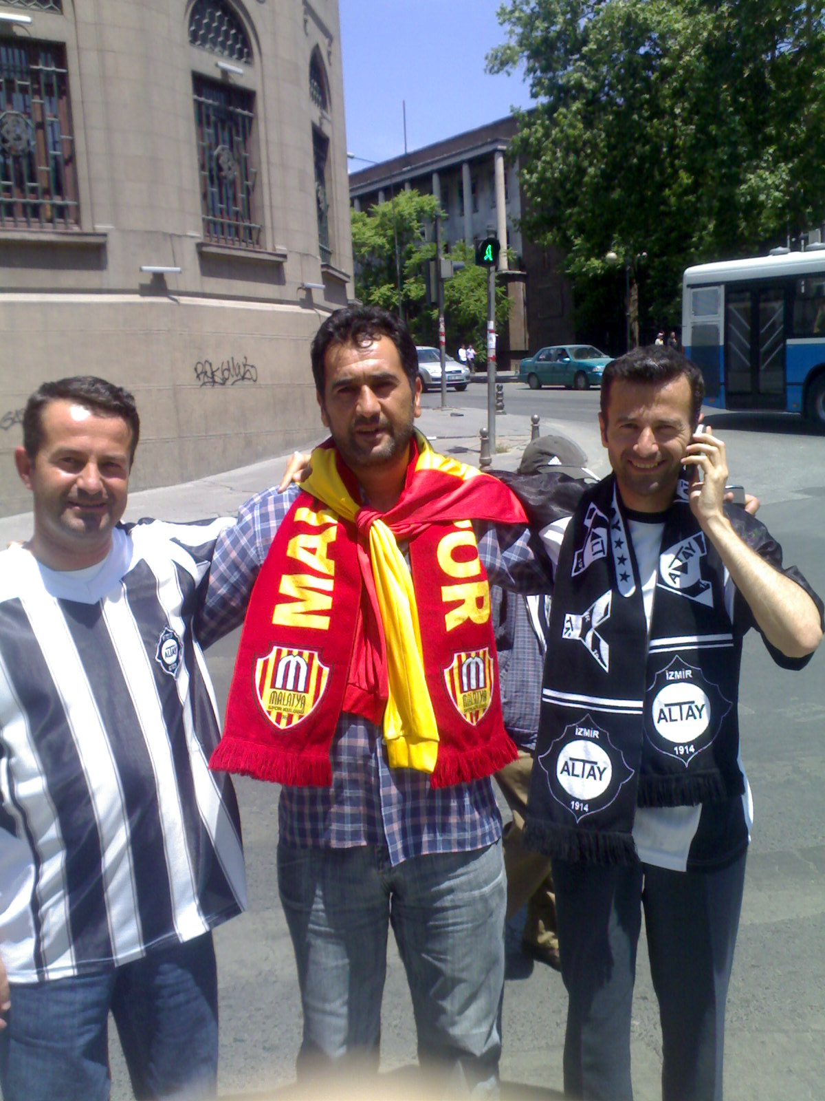 tamamen bana aittir